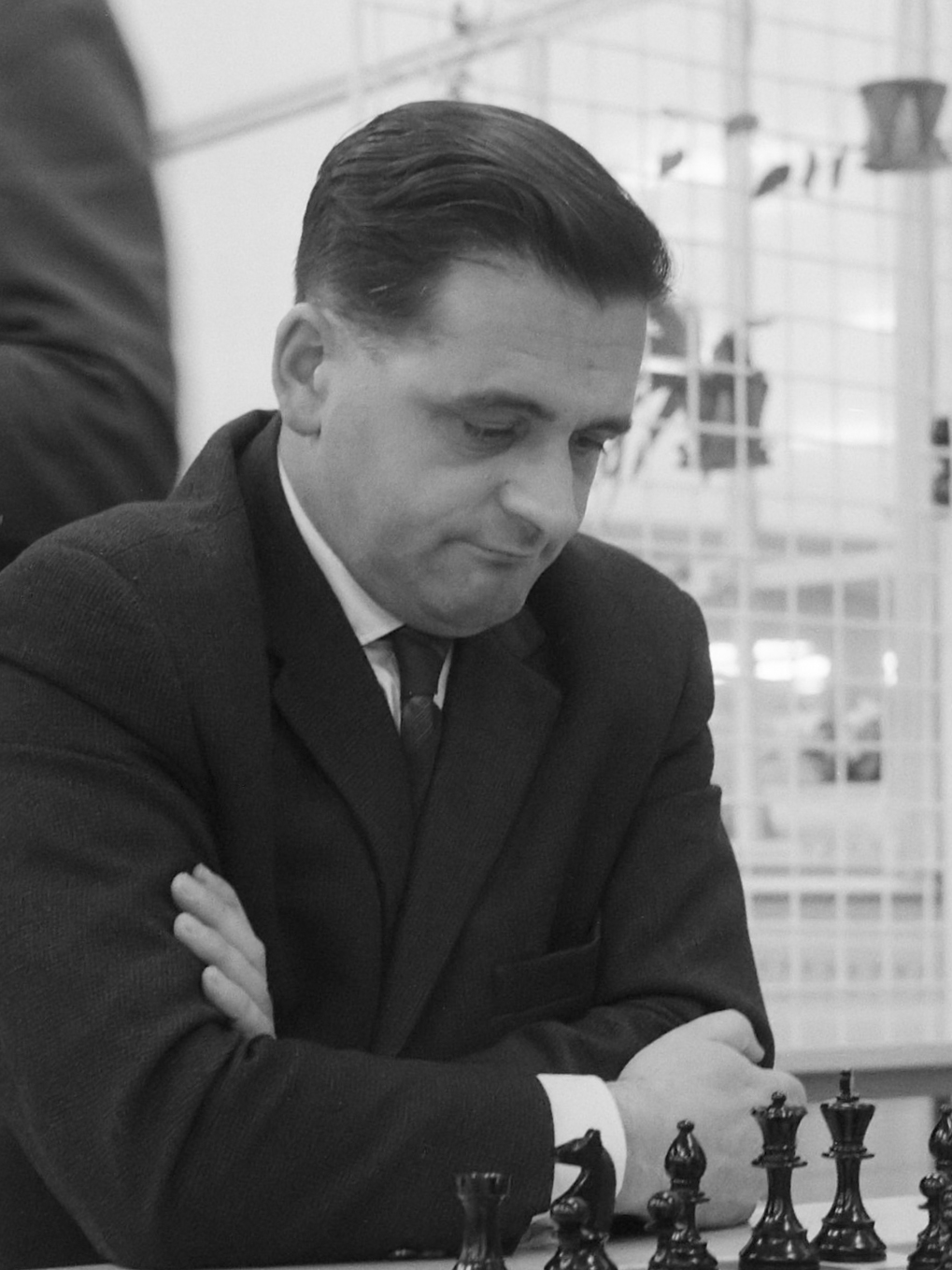 Zone-schaaktoernooi te Berg en Dal, Teschner 1 december 1960